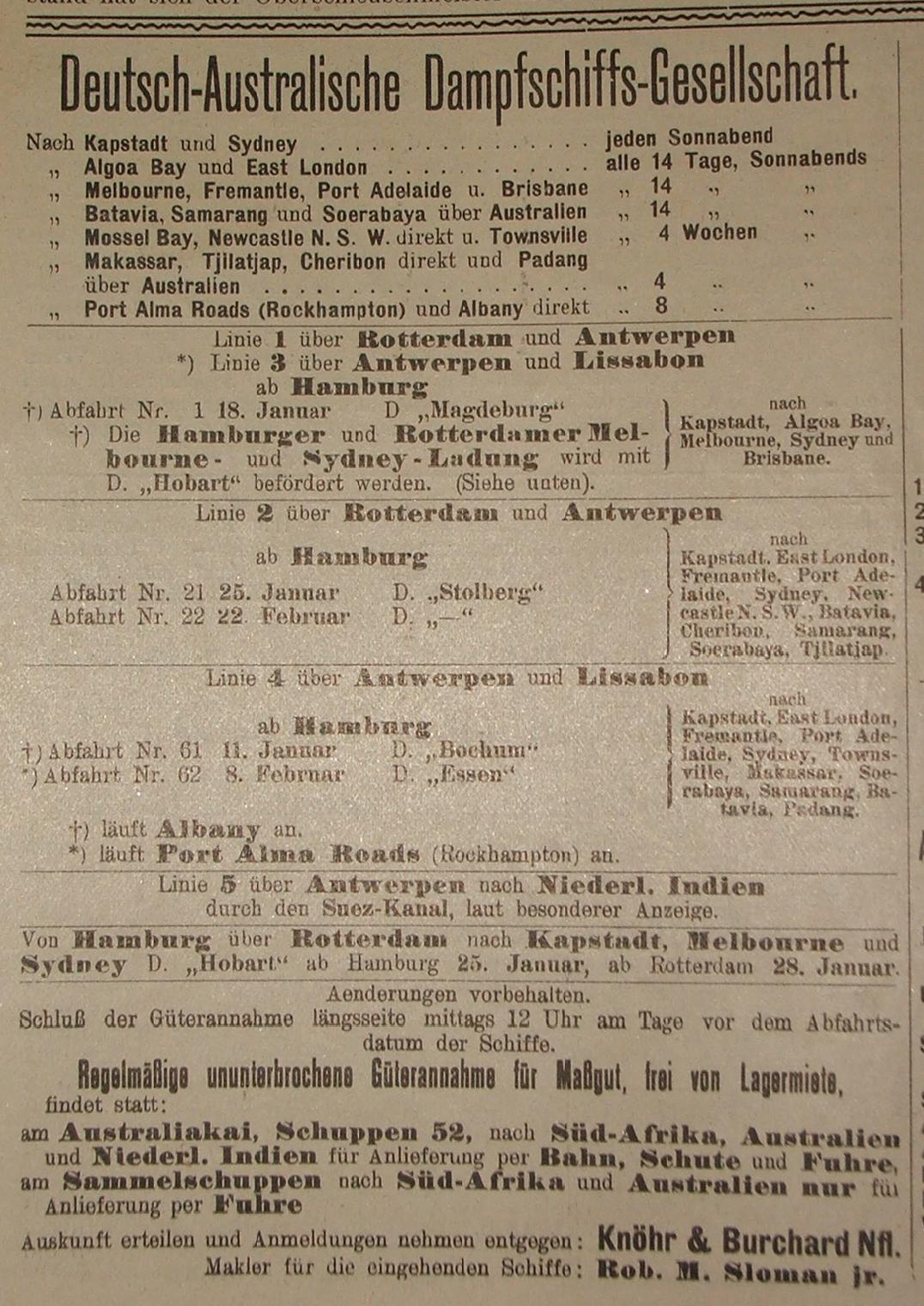 Deutsch-Australische_Dampfschiffs-Gesellschaft, Werbeanzeige in der Fachzeitschrift Hansa von 1913